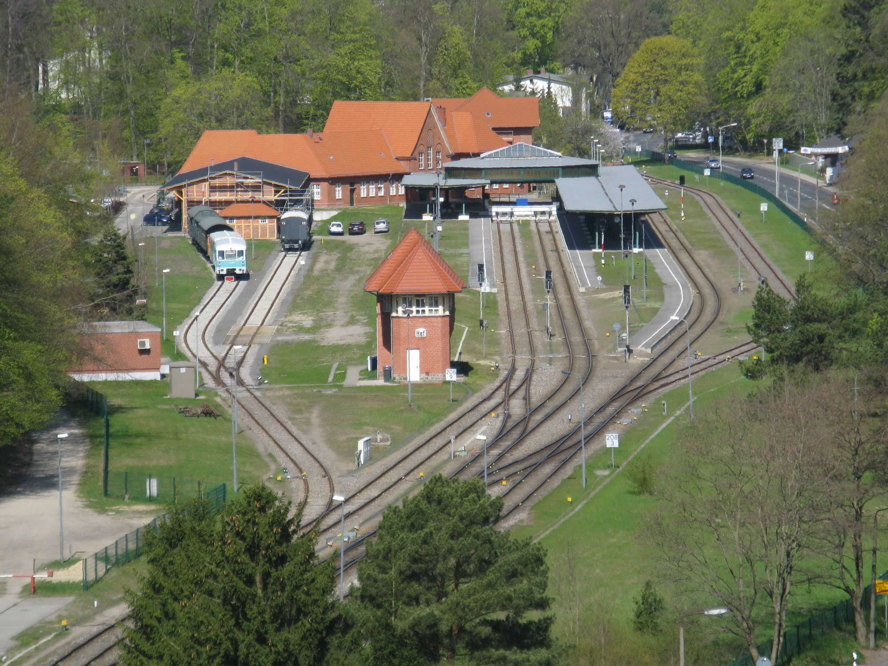 Bahnhof in Heringsdorf/Usedom an der Bahnstrecke Ducherow–Heringsdorf–Wolgaster Fähre